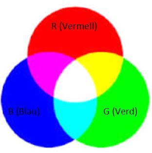 Taula dels colors basics amb combinacions entre ells.